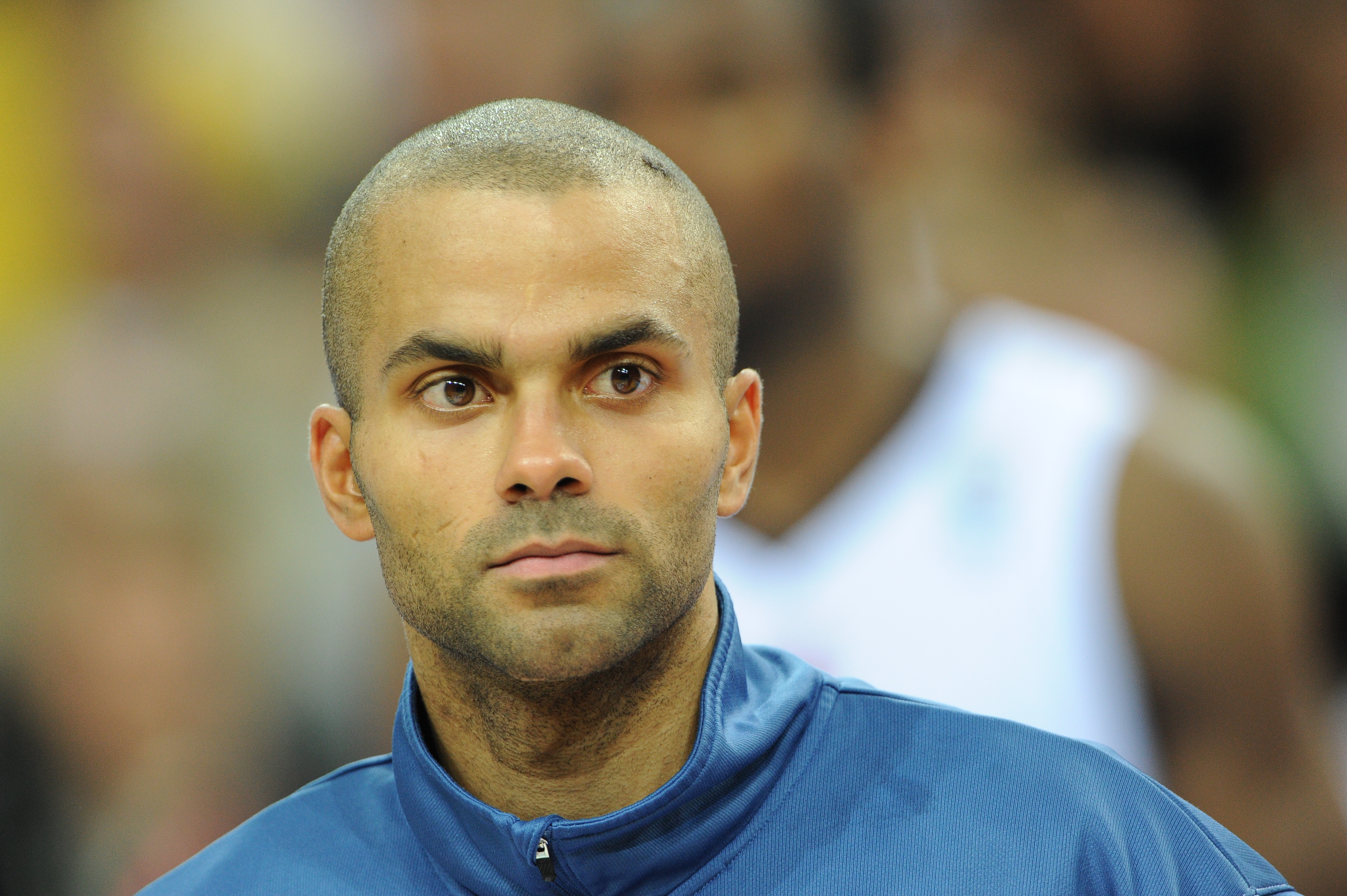 Tony Parker at Eurobasket 2011.